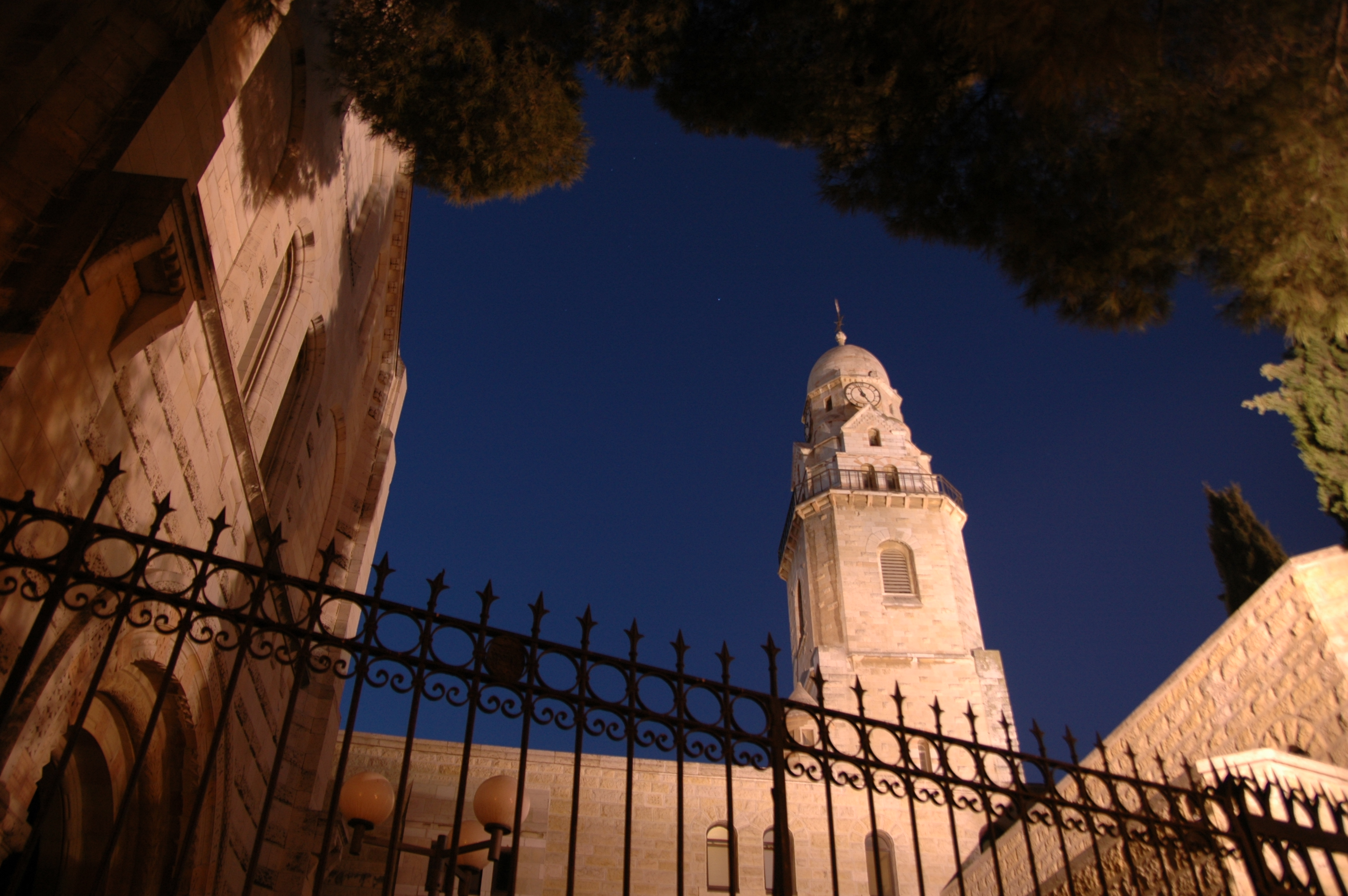 כנסיית דורמיציון היא כנסייה של המסדר הבנדיקטיני על הר ציון בירושלים, בקרבת שער ציון, קבר דוד ובסמוך לחומה הדרומית של העיר העתיקה. לפי אחת המסורות, היא ניצבת במקום בו נרדמה מרים, אם ישו לשנת הנצח. ב-1998 שונה השם ל'האגיה מריה סיון'.